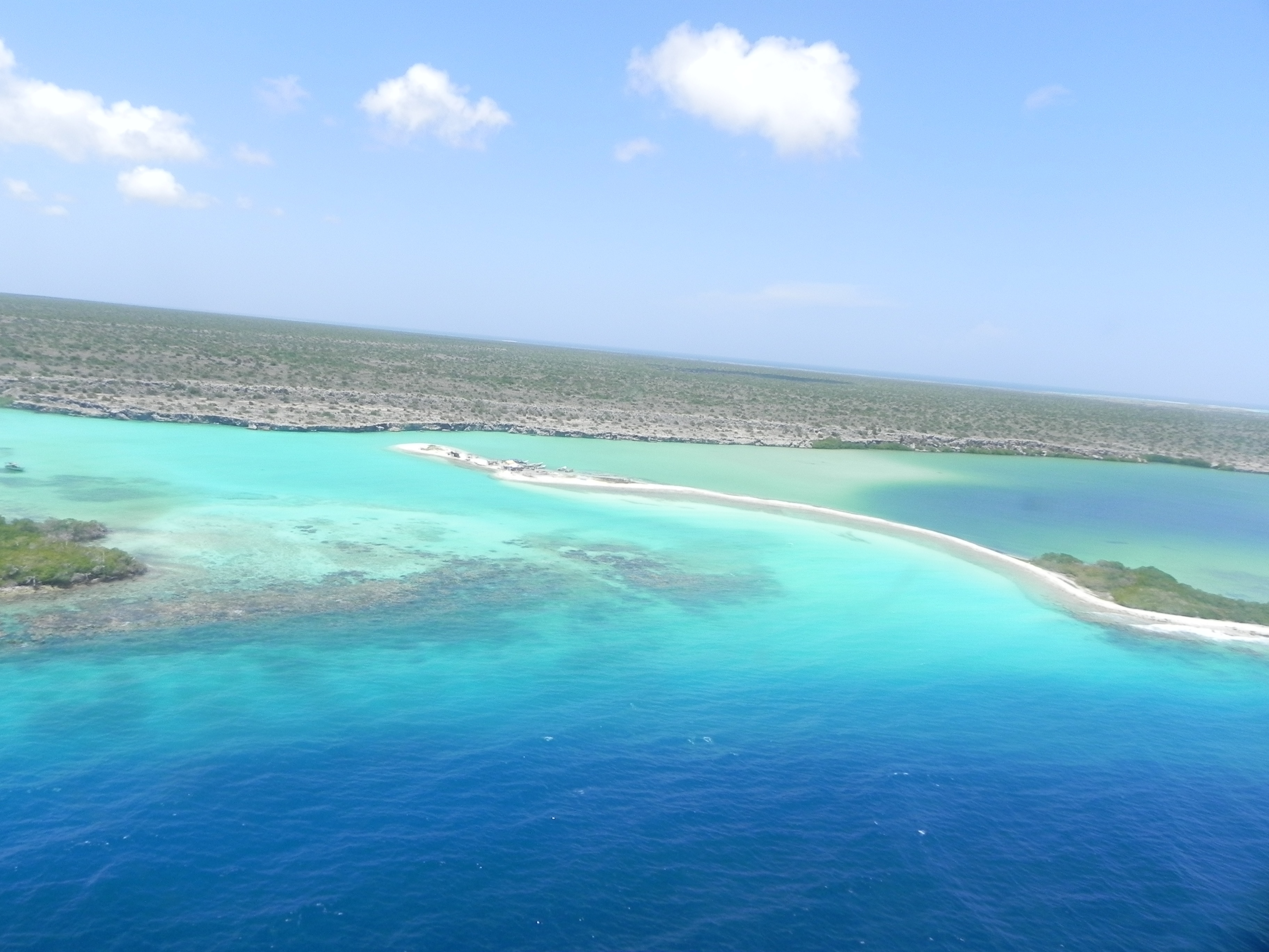 EN LA ISLA DE LA TORTUGA FRENTE A HIGUEROTE , MAR CARIBE